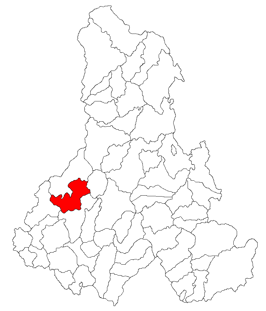 Categorie:Hărţi ale judeţului Harghita Contents 1 Licensing 2 Sursă 3 Licensing 4 Original upload log Licensing Sursă ro::Imagine:Harta_jud_Harghita.png